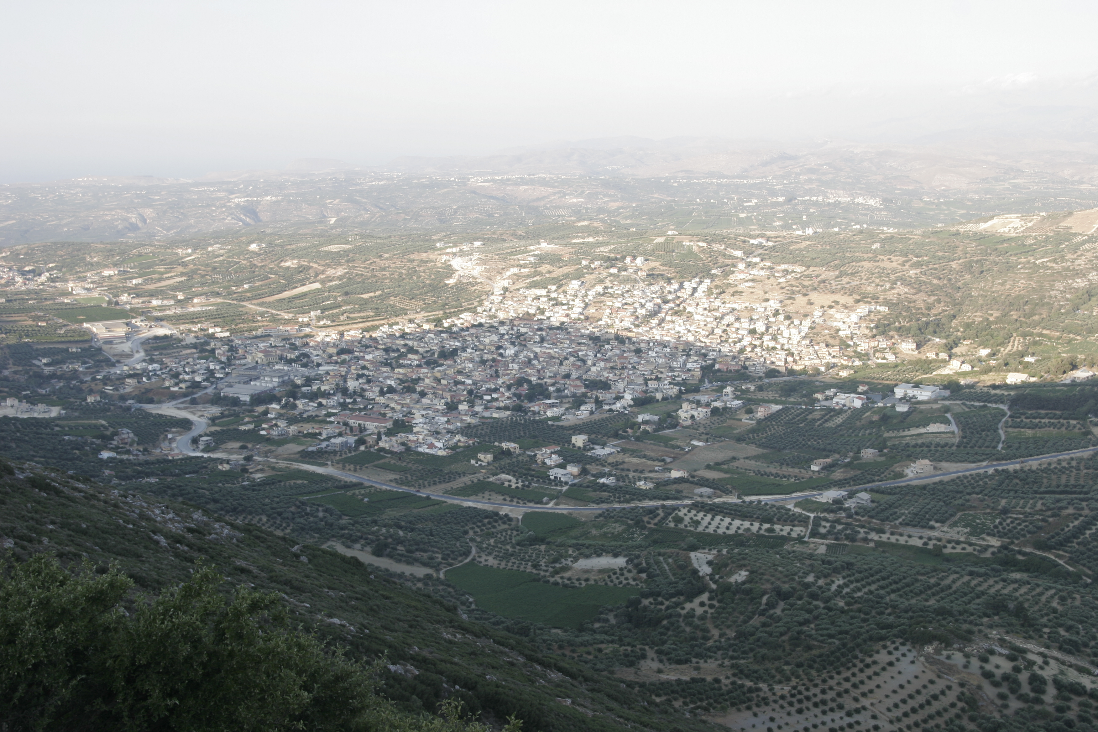 Vue de la ville d'Archanes, Grèce, prise depuis le mont Gyourtas